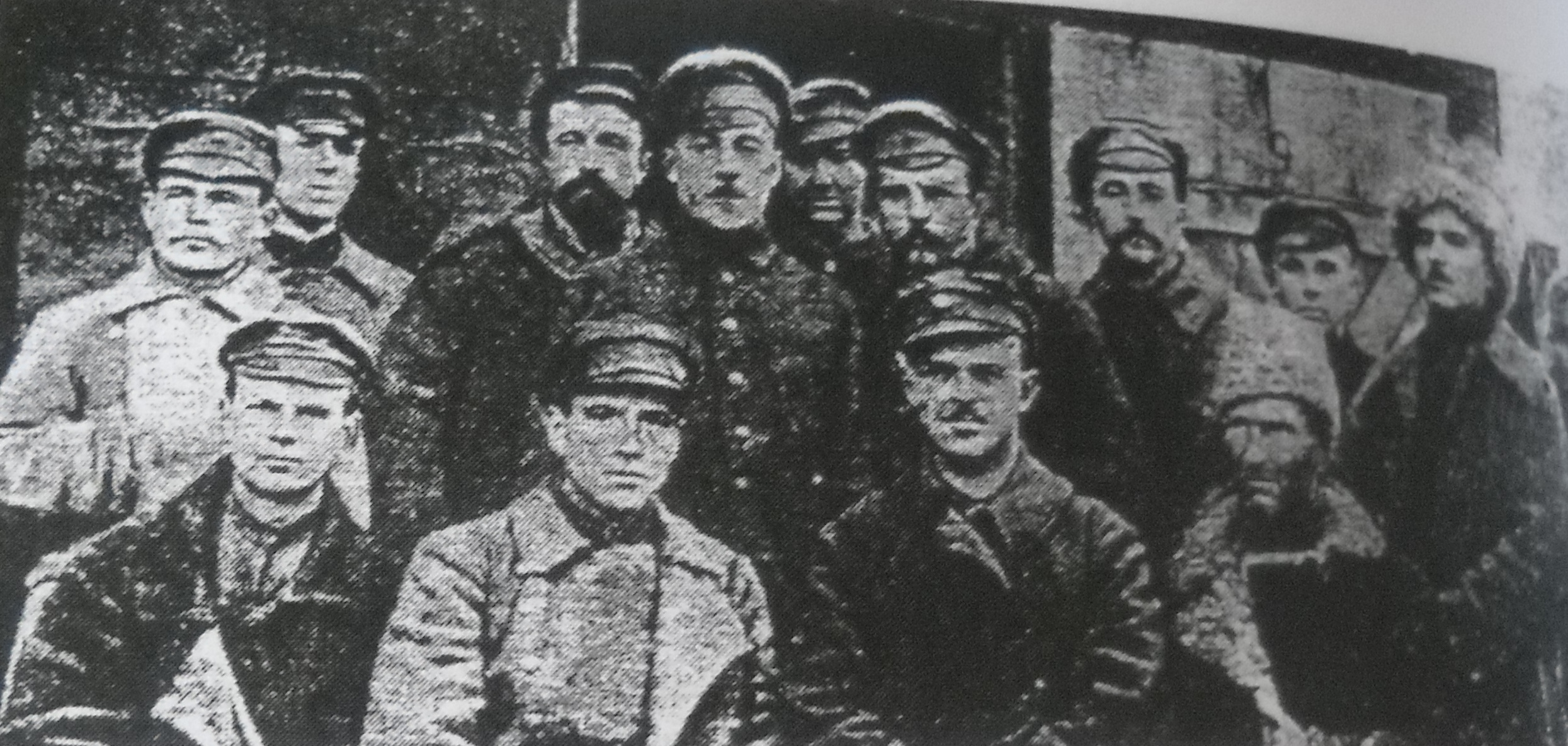 Grupa internowanych Ukraińców z Obozu Internowania w Aleksandrowie Kujawskim, zrzeszonych w spółdzielni obozowej